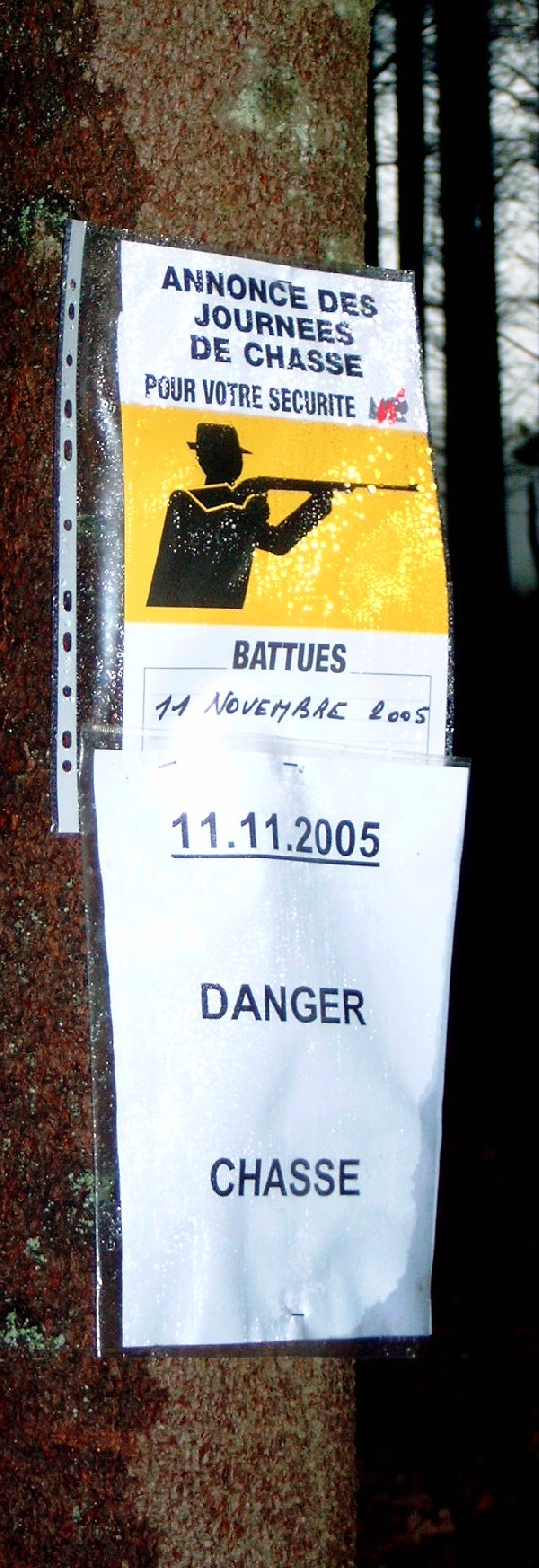 Annonce de battue.